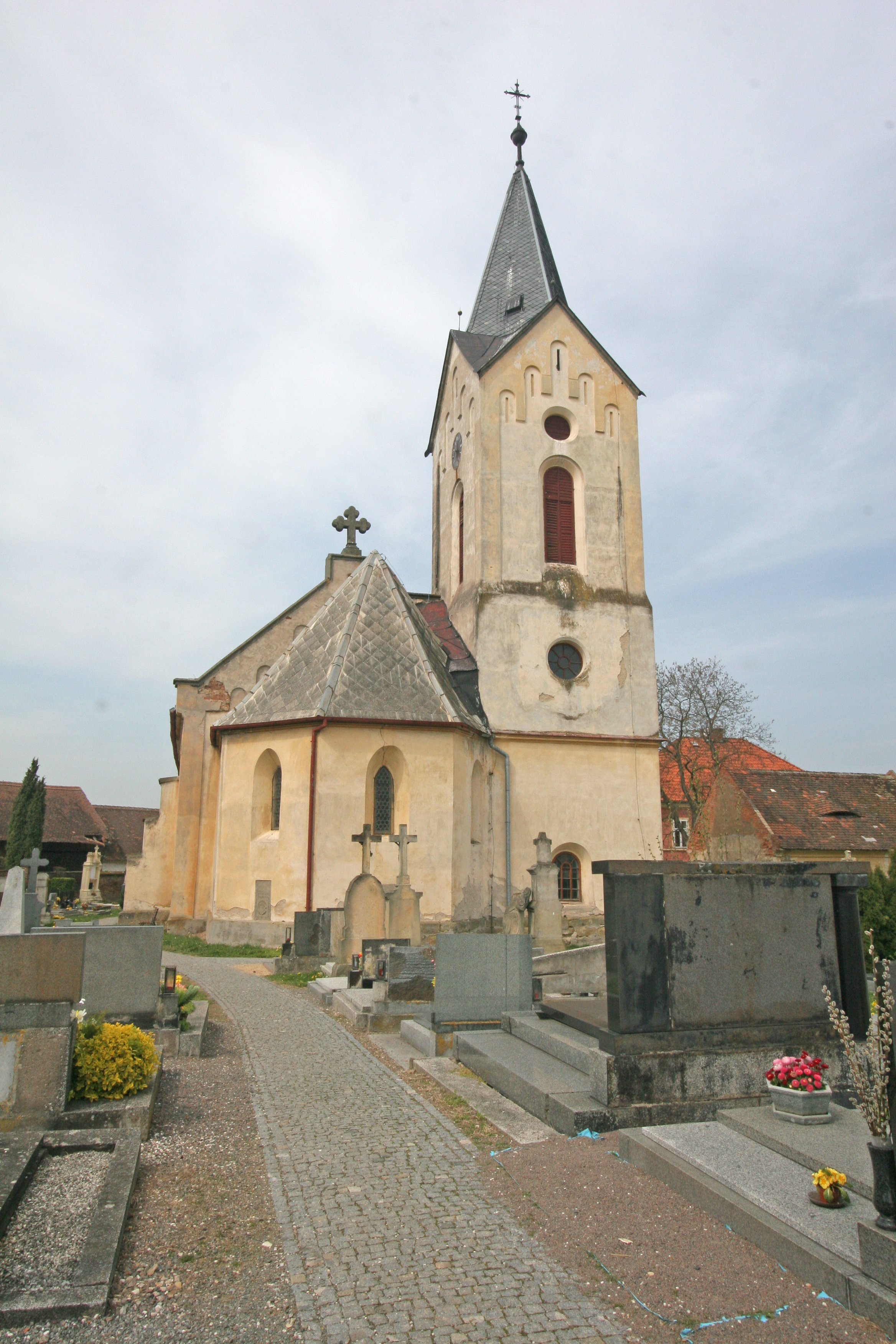 Morašice kostel svatého Víta